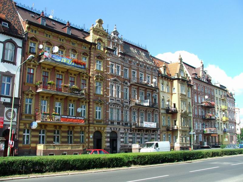 Kamieniczna zabudowa ulicy Witelona w Legnicy